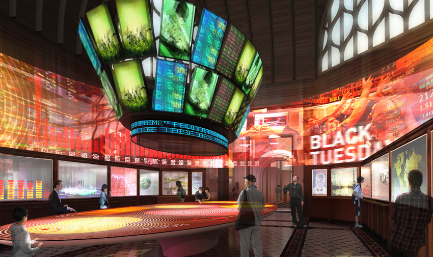 Grand hall - Grand lobby Image du concours architectural et muséographique, 2011.